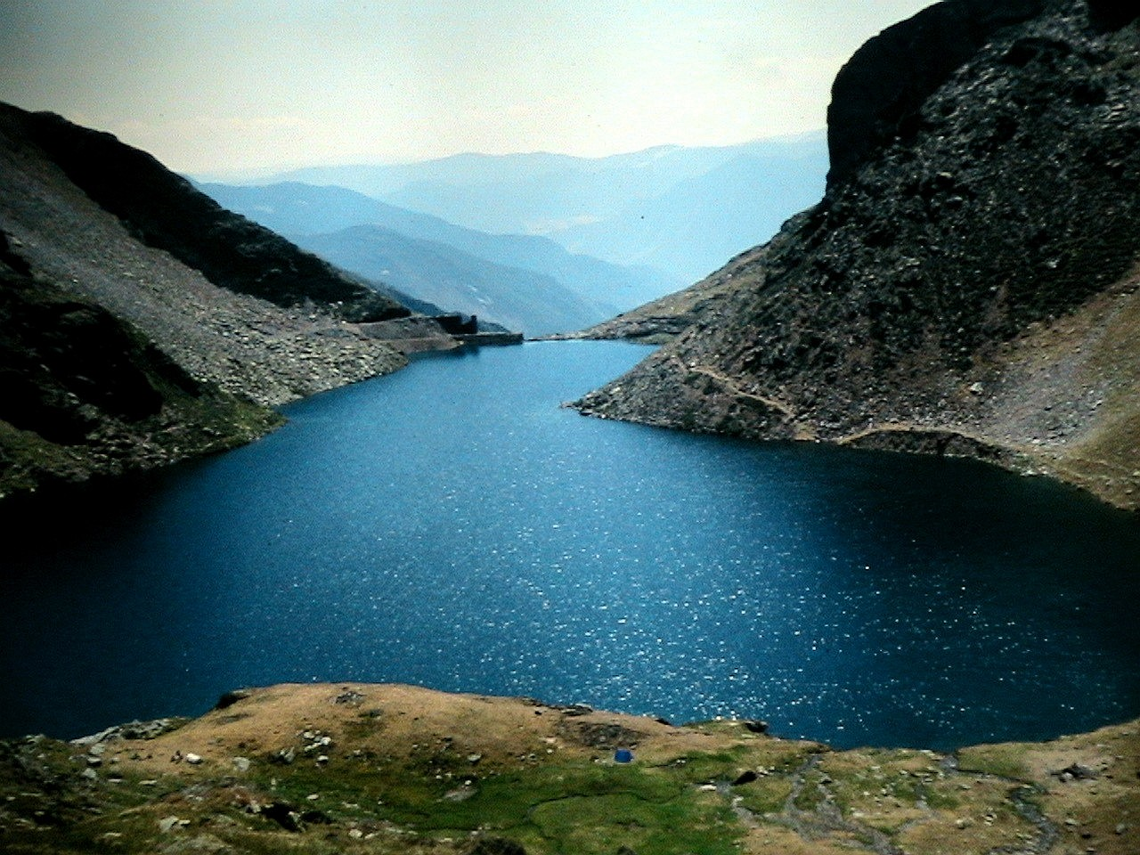 Estany de la Gola, a la capçalera de la vall d'Unarre (any 1986). Foto de la projecció d'una diapositiva. This is a a photo of a natural area in Catalonia, Spain, with id: ES510084